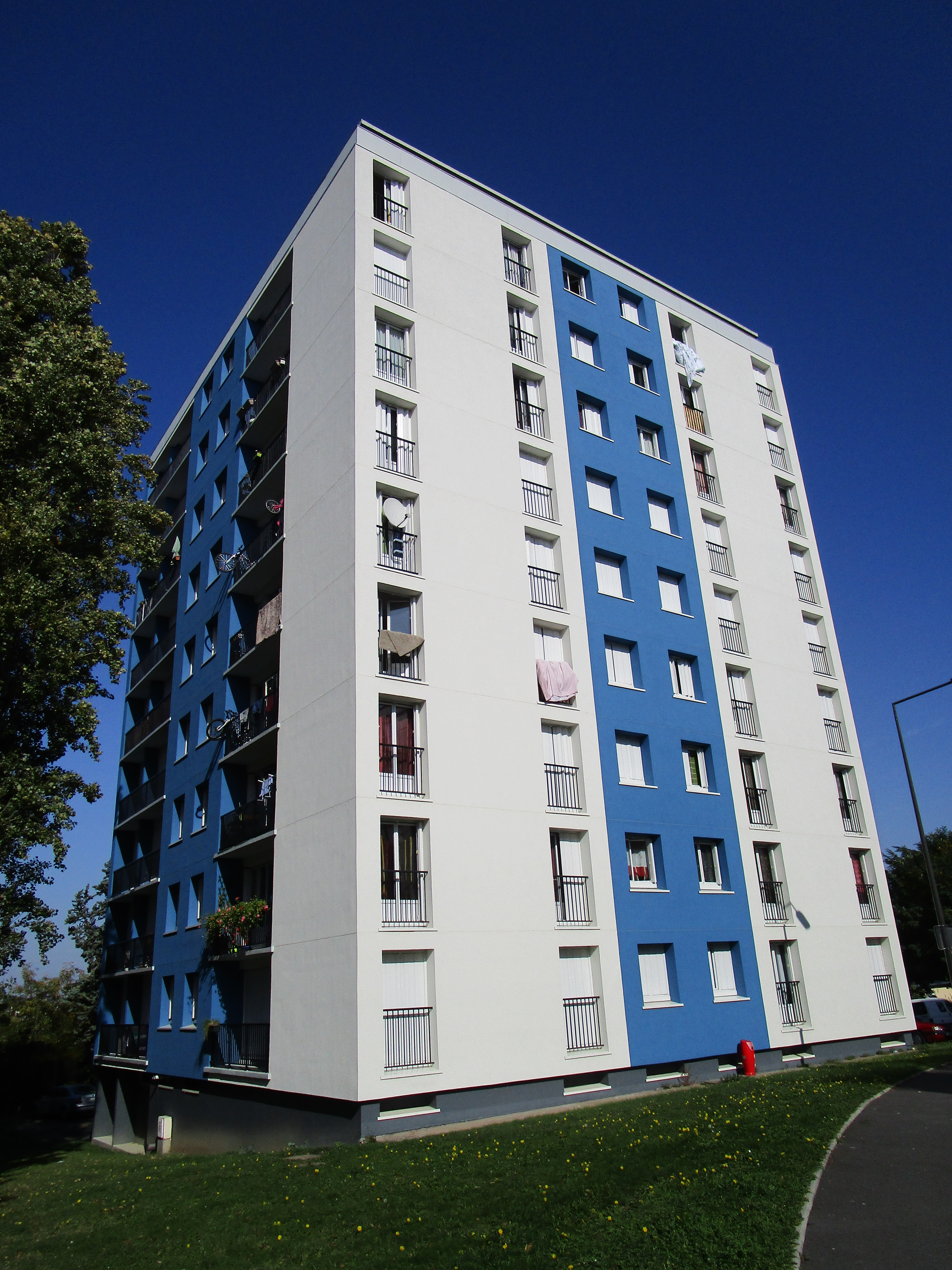 Tour sur l'allée Jean de la Bruyère, dans la partie est du quartier de la Bergeonnerie, à Tours